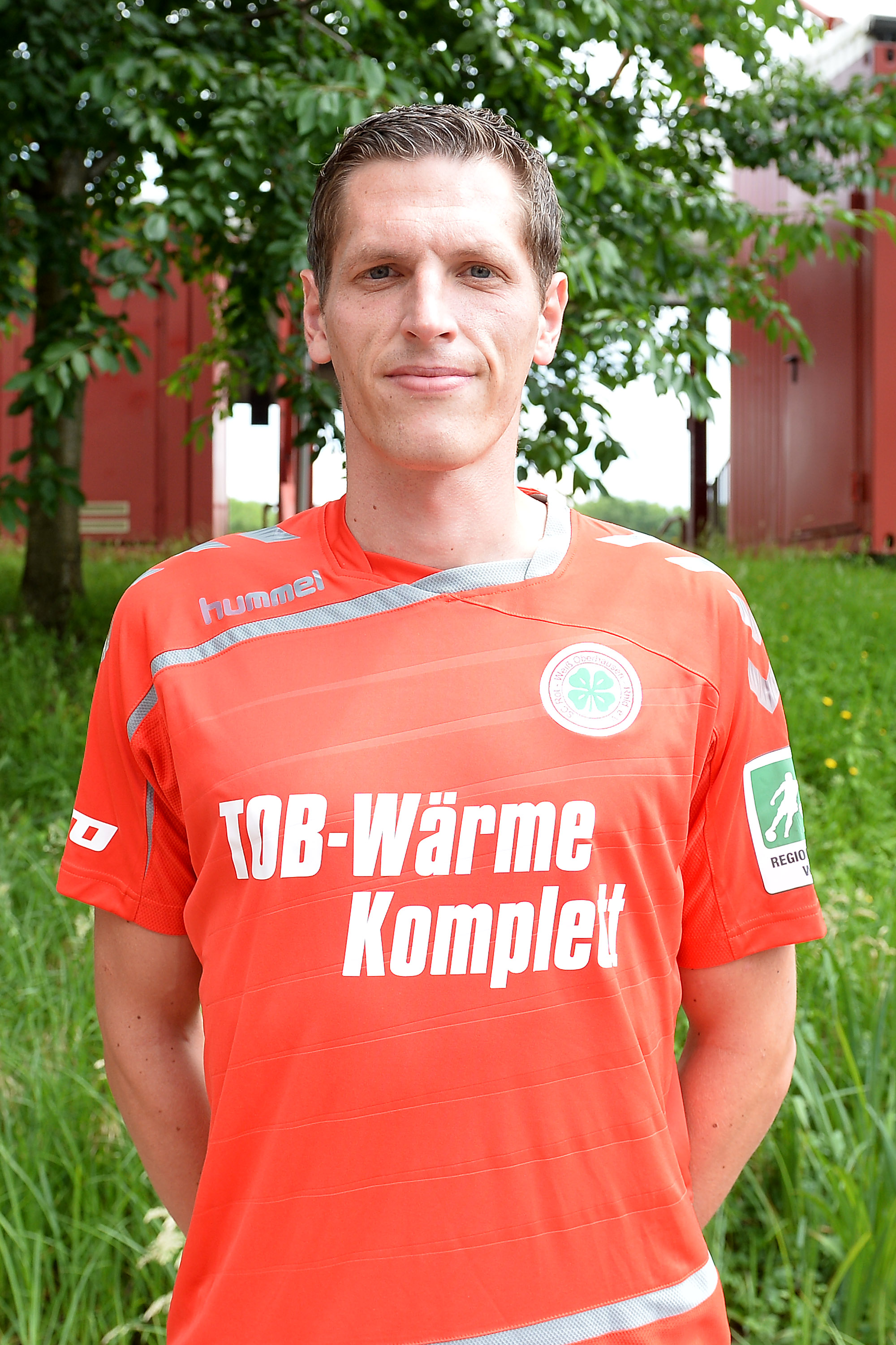 Offizielles RWO Portrait Foto